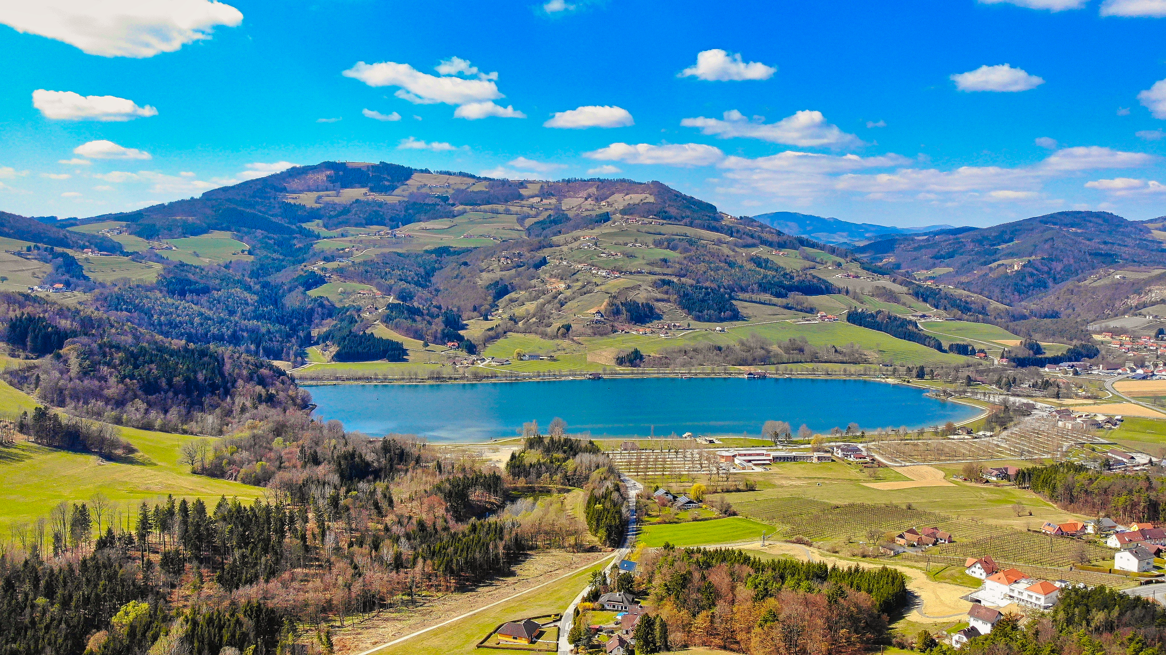 Luftbildaufnahme vom Stubenbergsee April 2020